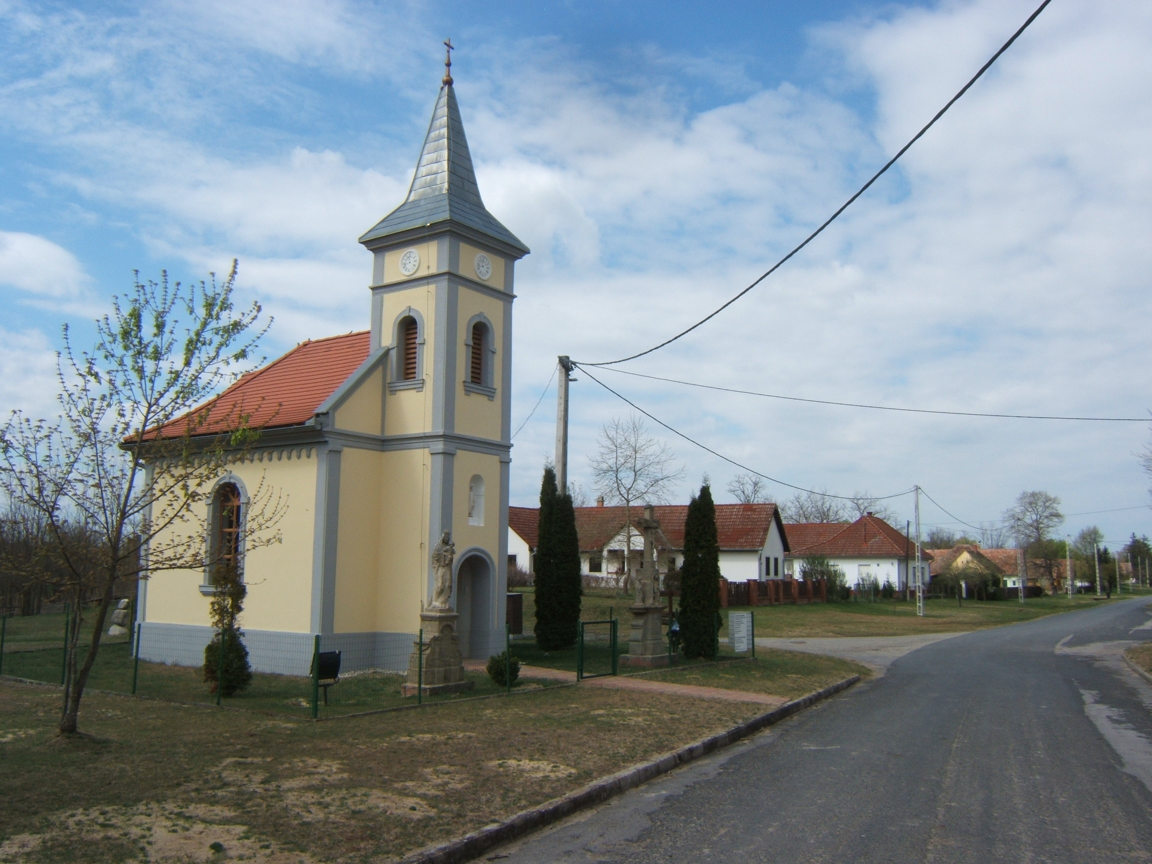 Libickozma